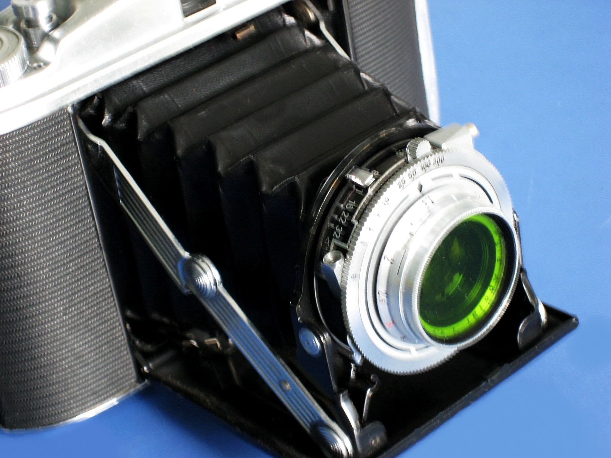 Fotokamera